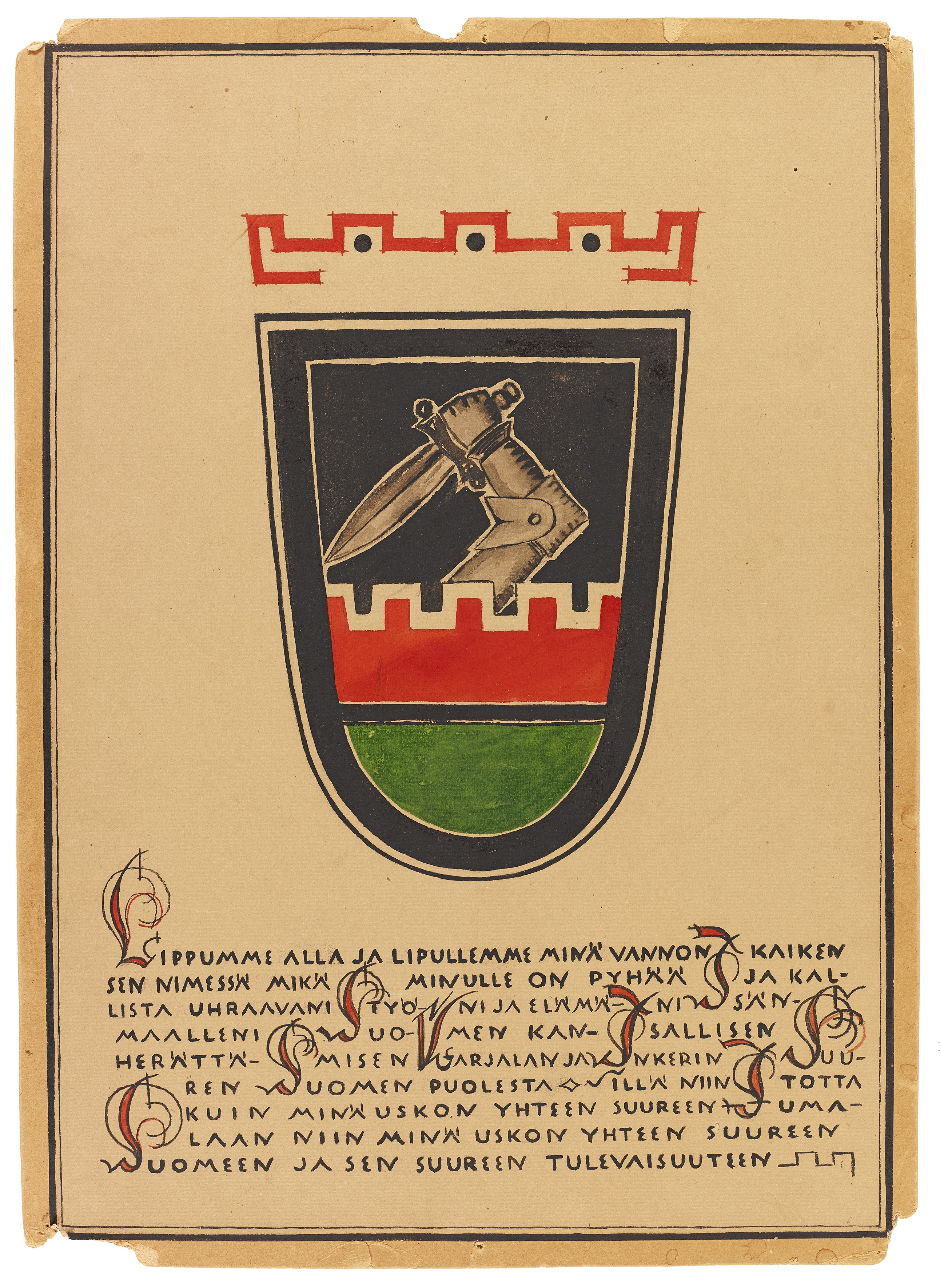 Akateemisen Karjala-seuran valataulu 1922-1940Lippumme alla ja lipullemme minä vannon – kaiken sen nimessä, mikä on minulle pyhää ja kallista – uhraavani työni ja elämäni Isänmaalleni Suomen kansallisen herättämisen, Karjalan ja Inkerin, Suuren Suomen puolesta. Sillä niin totta kuin minä uskon yhteen suureen Jumalaan, niin minä uskon yhteen suureen Suomeen ja sen suureen tulevaisuuteen.